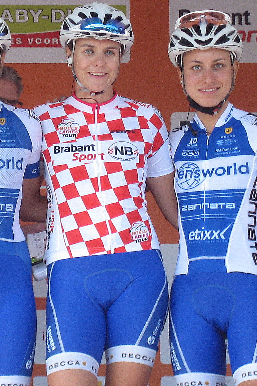 Winanda Spoor (Lensworld-Zannata) voor start 3e etappe Holland Ladies Tour 2016